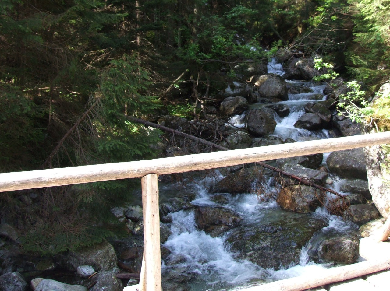 Spismichałowy Potok przy szlaku turystycznym przez Dolinę Białej Wody